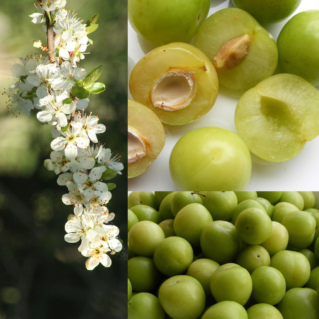 Grafika podręcznika Wikijunior:Owoce. Renkloda, podgatunek śliwy domowej (Prunus domestica subsp. italica).